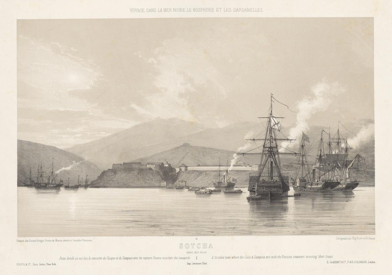 Русская эскадра на траверзе форта Александрия, 1839 год